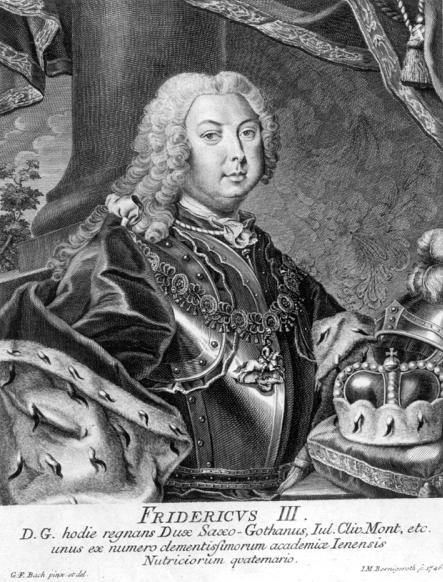 Friedrich III. von Sachsen-Gotha-Altenburg (1699-1772)